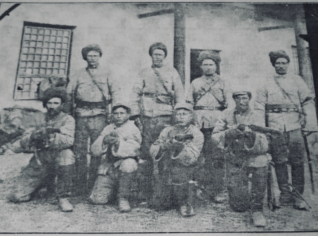 中文（中国大陆）: 刊登于1947年的复旦大学回教同学会编的《天山》